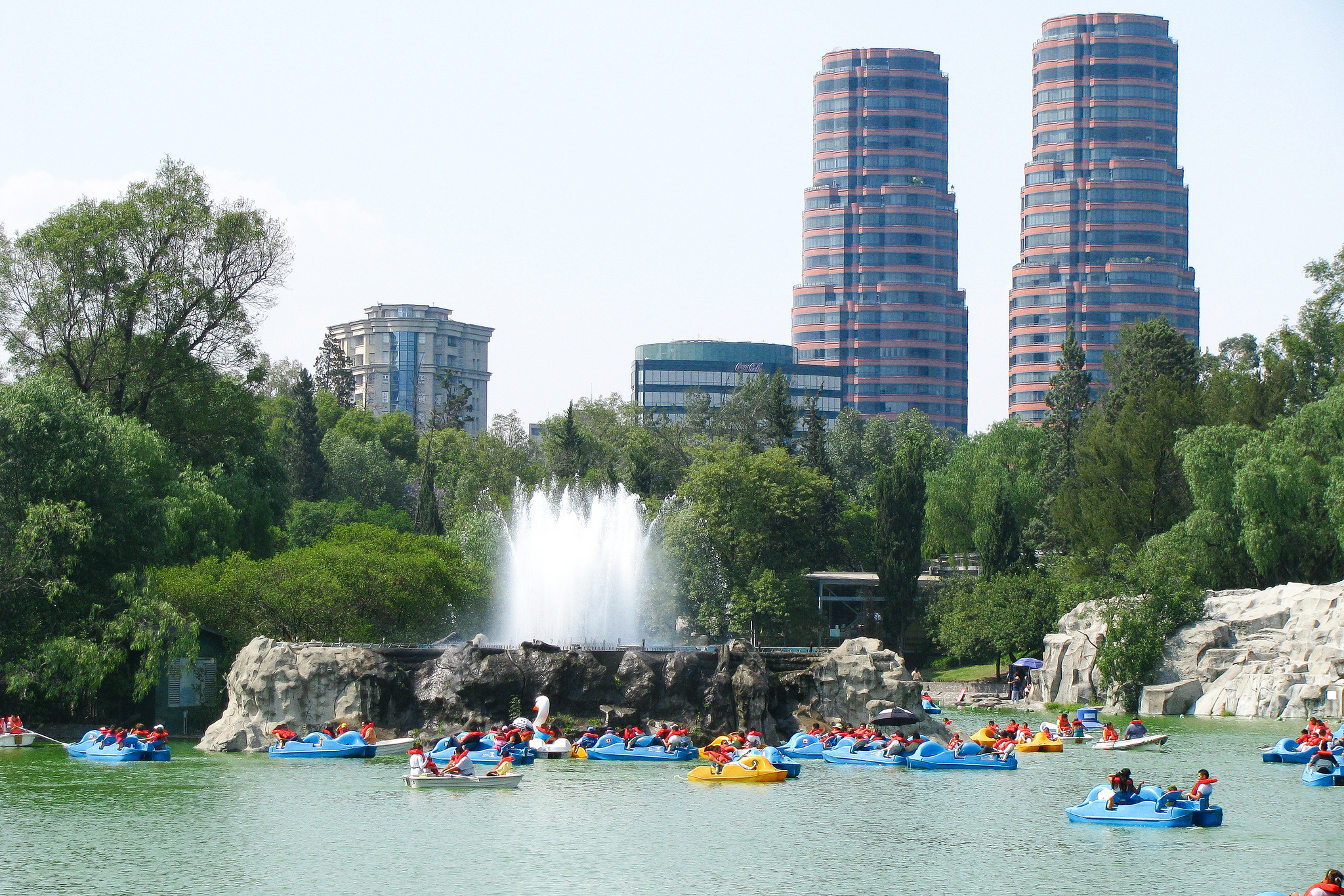 Lago de Chapultepec y las Torres Genelas de Polanco